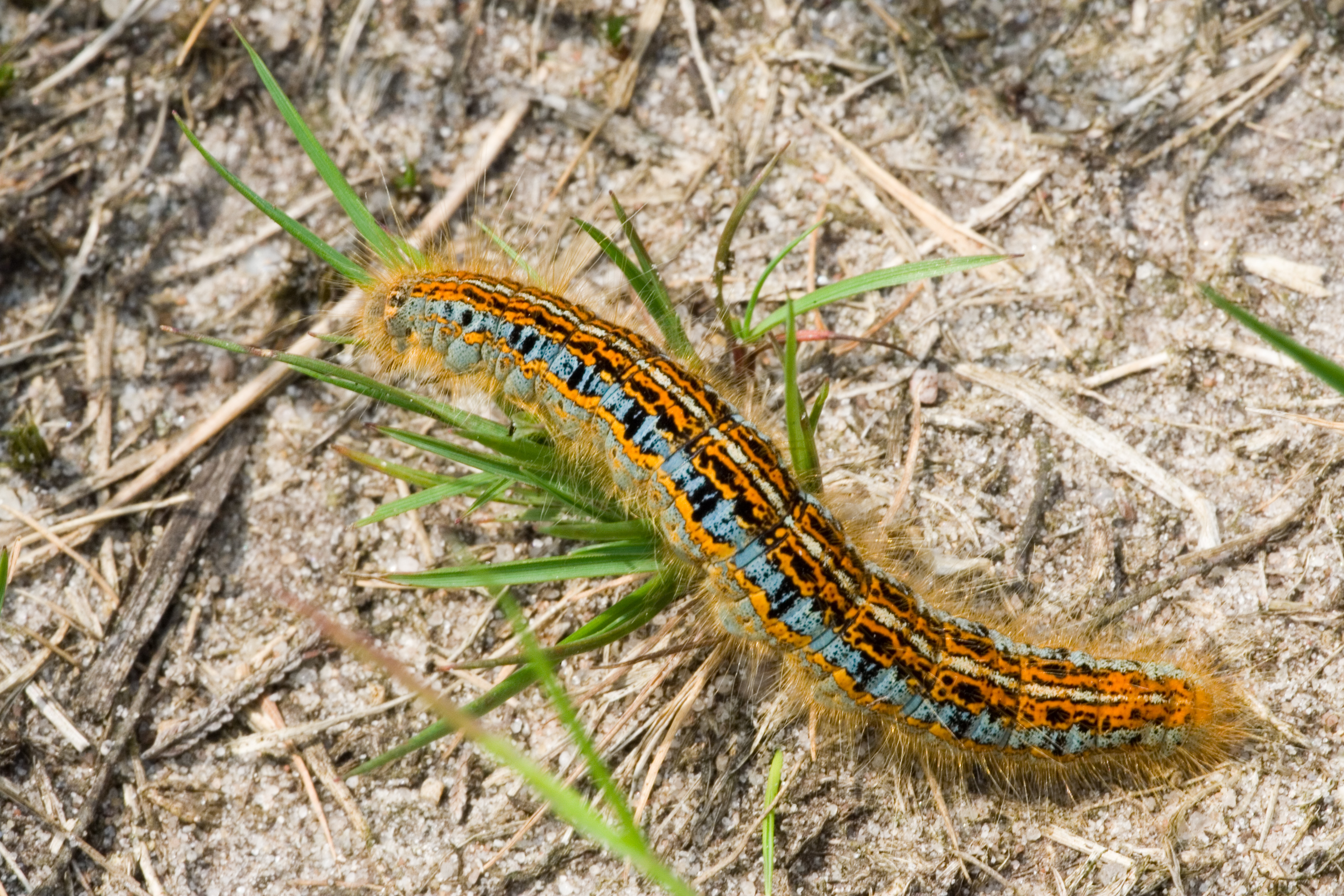 Malacosoma castrensis